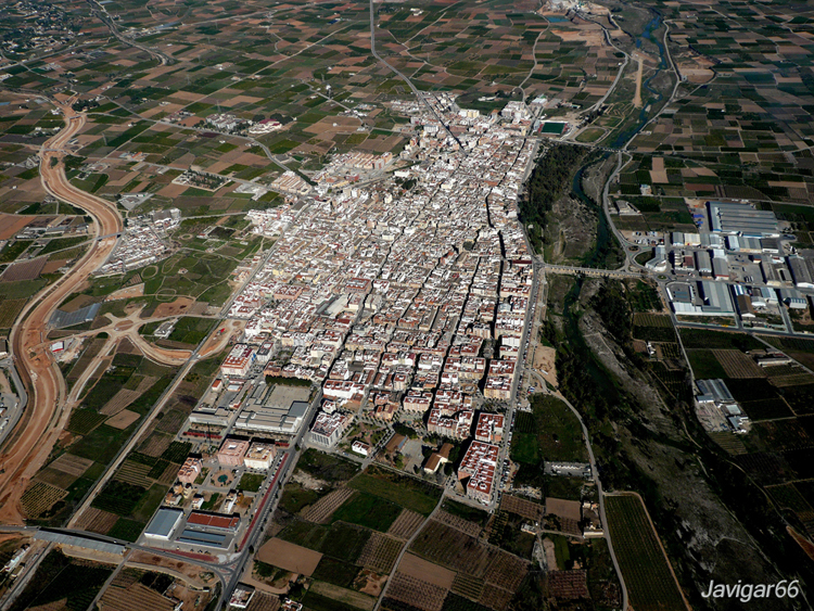 Foto aérea de Carlet. Altura 1500 m. Tomada desde mi paramotor.